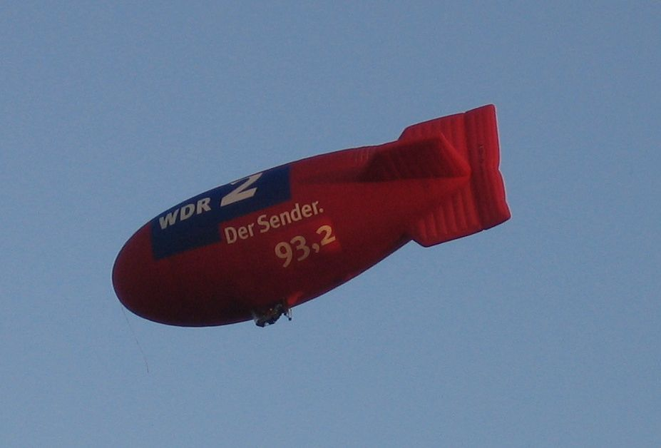 Anläßlich der Bielefelder "Baustellen-Party" überflog dieses Teil die Stadt.